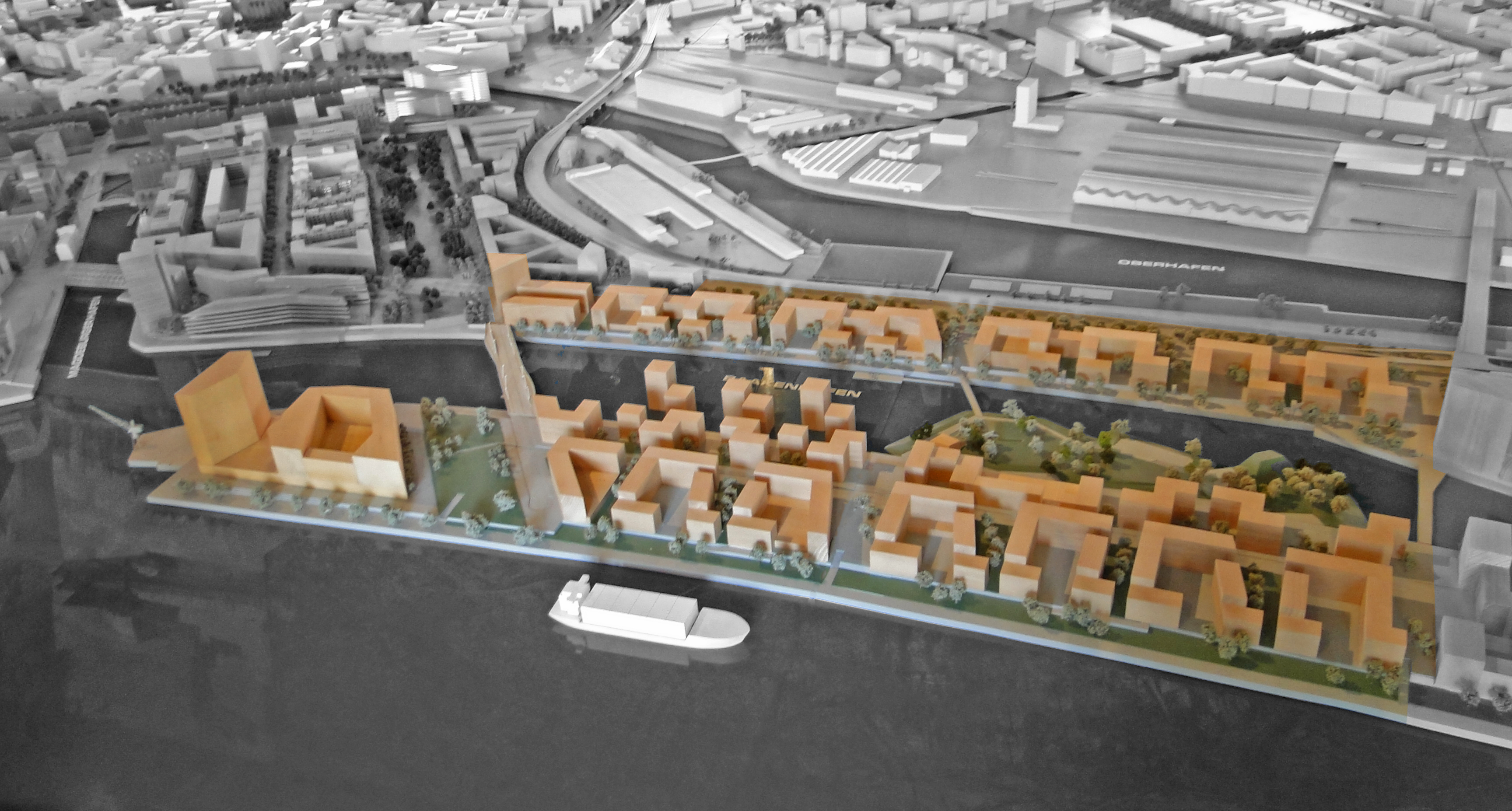 Modell des Quartiers Baakenhafen in der HafenCity in Hamburg.